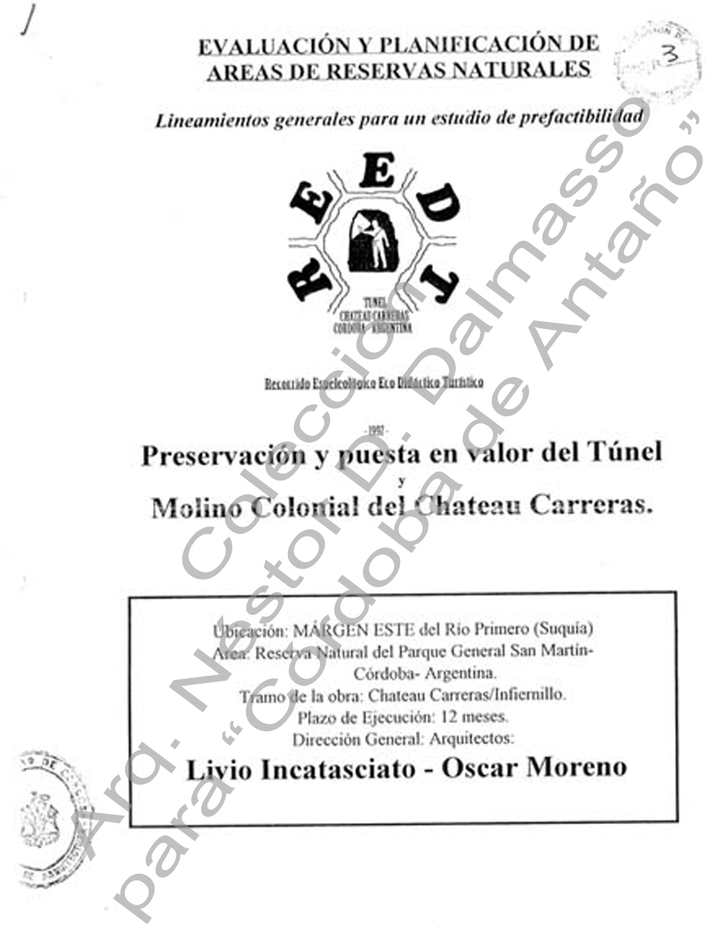 Livio Incatasciato 05 Reedt-P